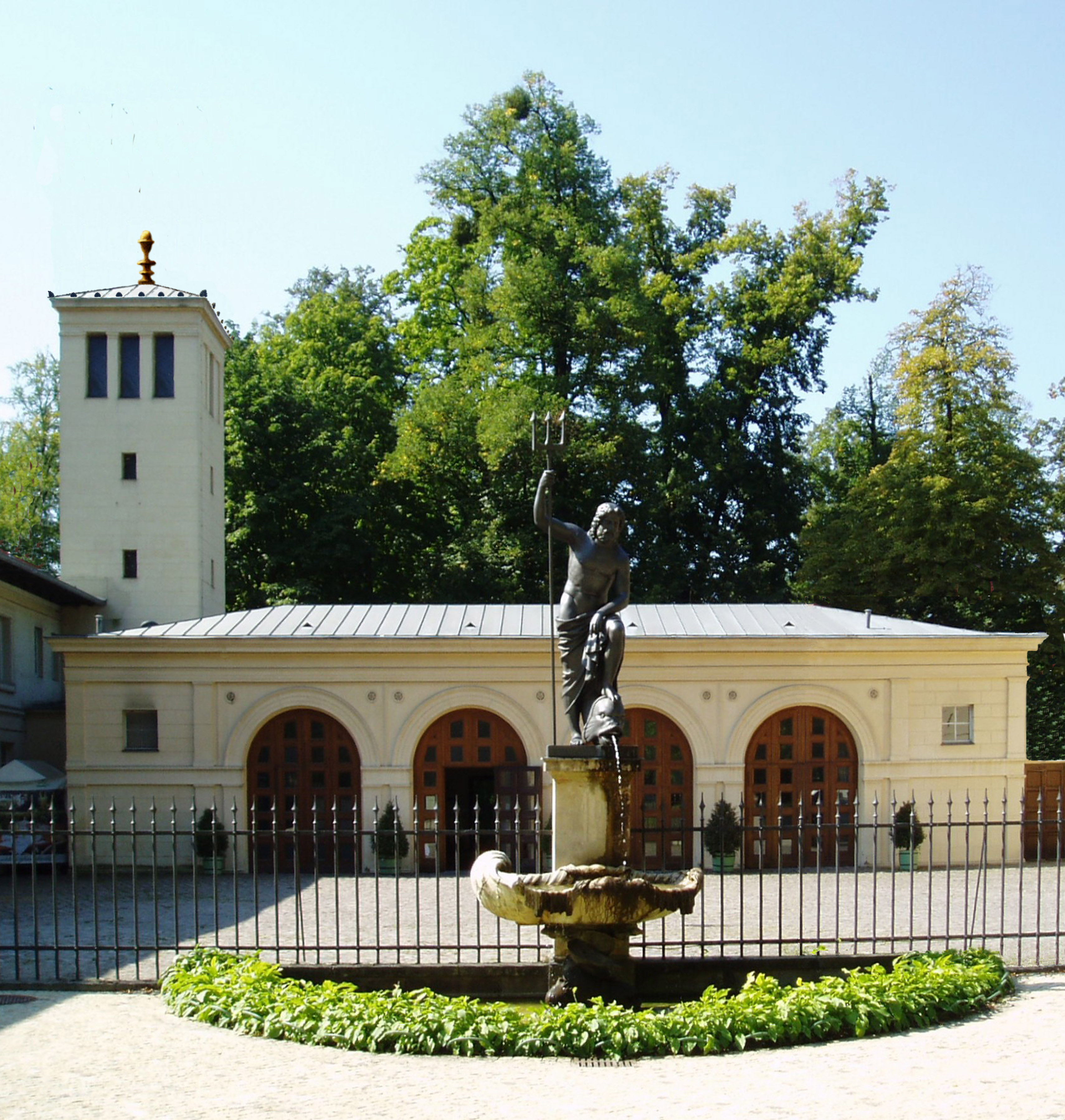 Turm und Remise im ursprünglichen Zustand, Fotomontage unter Verwendung einer Aufnahme von Suse 2009